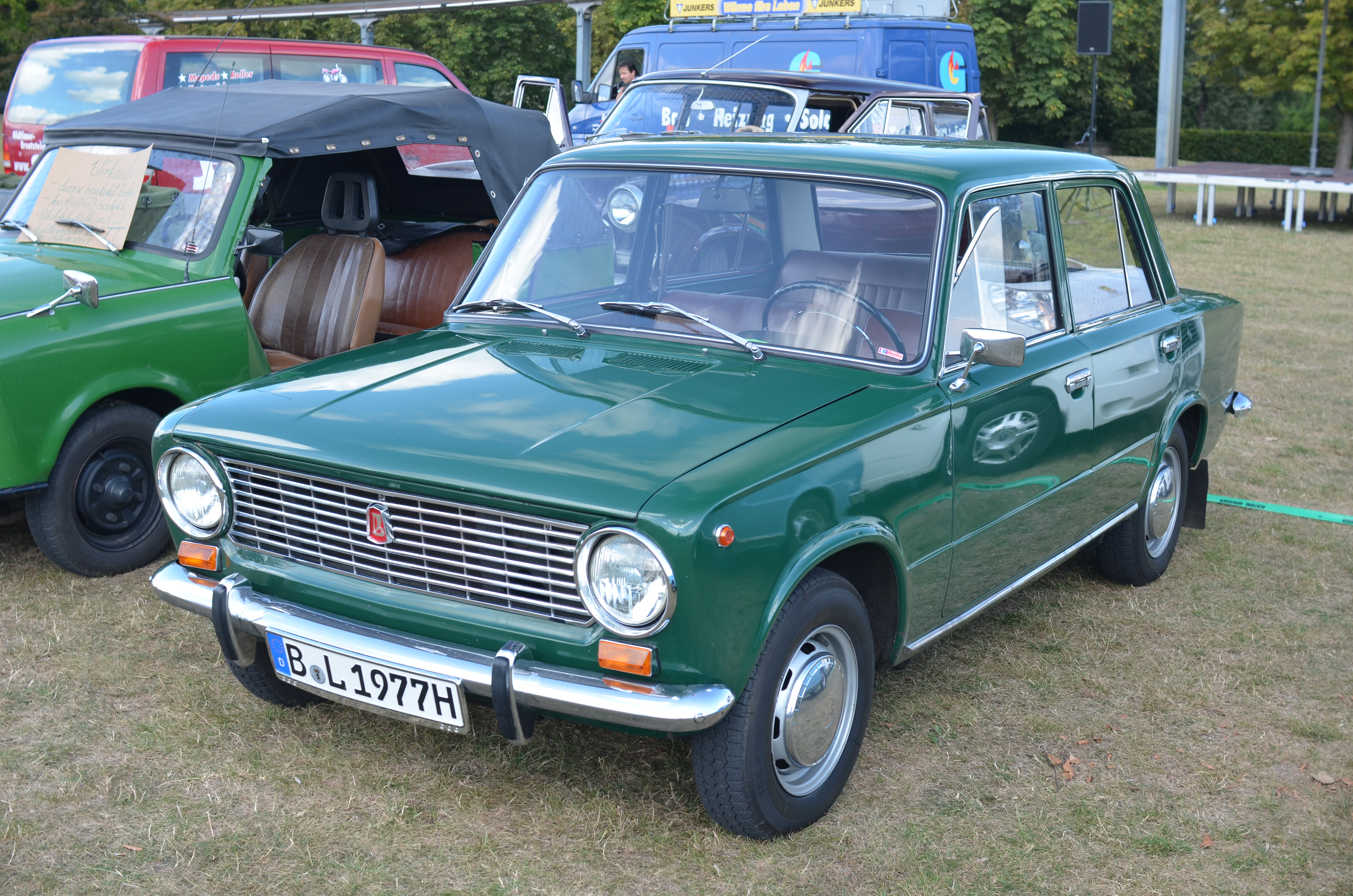 Lada